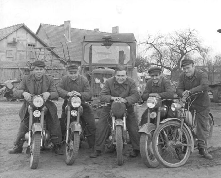 Title: Mais-Musketiere der MTS "Vorwerk" 50 Doppelzentner mehr vom Hektar" Factual corrections and alternative descriptions are encouraged separately from the original description. Additionally errors can be reported at this page to inform the Bundesarchiv. Original historic description: Zentralbild-Wotin-Me-Fr-2.5.1960 Mais-Musketiere der MTS "Vorwerk" 50 Doppelzentner mehr vom Hektar-Im Wettbewerb der Jugendbrigaden im vergangen Jahr wurden sie mit dem "Goldenen Traktor" ausgezeichnet.Kaum erschien der Schafstädter Aufruf,waren sie sich einig: Wir sind mit dabei.Auf 12 Prozent der Ackerfläche wird Mais angebaut,den sie von der Aussaat bis zum Silieren in persönliche Pflege nehmen.Statt der vorgesehenen 50 dz Silomais wollen sie 550 dz pro Hektar ernten.Von einem Hektar Grünmais haben sie sich vorgenommen, 350dz zu ernten.Auf normalen Flächen legen sie den Mais in Auswertung der Manukowski-Methode im Quadratnestverband aus.Auf den hügeligen Feldern legen sie den Mais in Reihen aus und bearbeiten ihn quer,um auch hier durch das Quadratverfahren zu hohen Hektarerträgen zu kommen.UBZ: Die Mais-Musketiere der MTS "Vorwerk" Bezirk Neubrandenburg(v.l.n.r.) Manfred Graf,Walter Bergemann, Gerhard Kruse, Werner Wegner und Horst Gülzow."